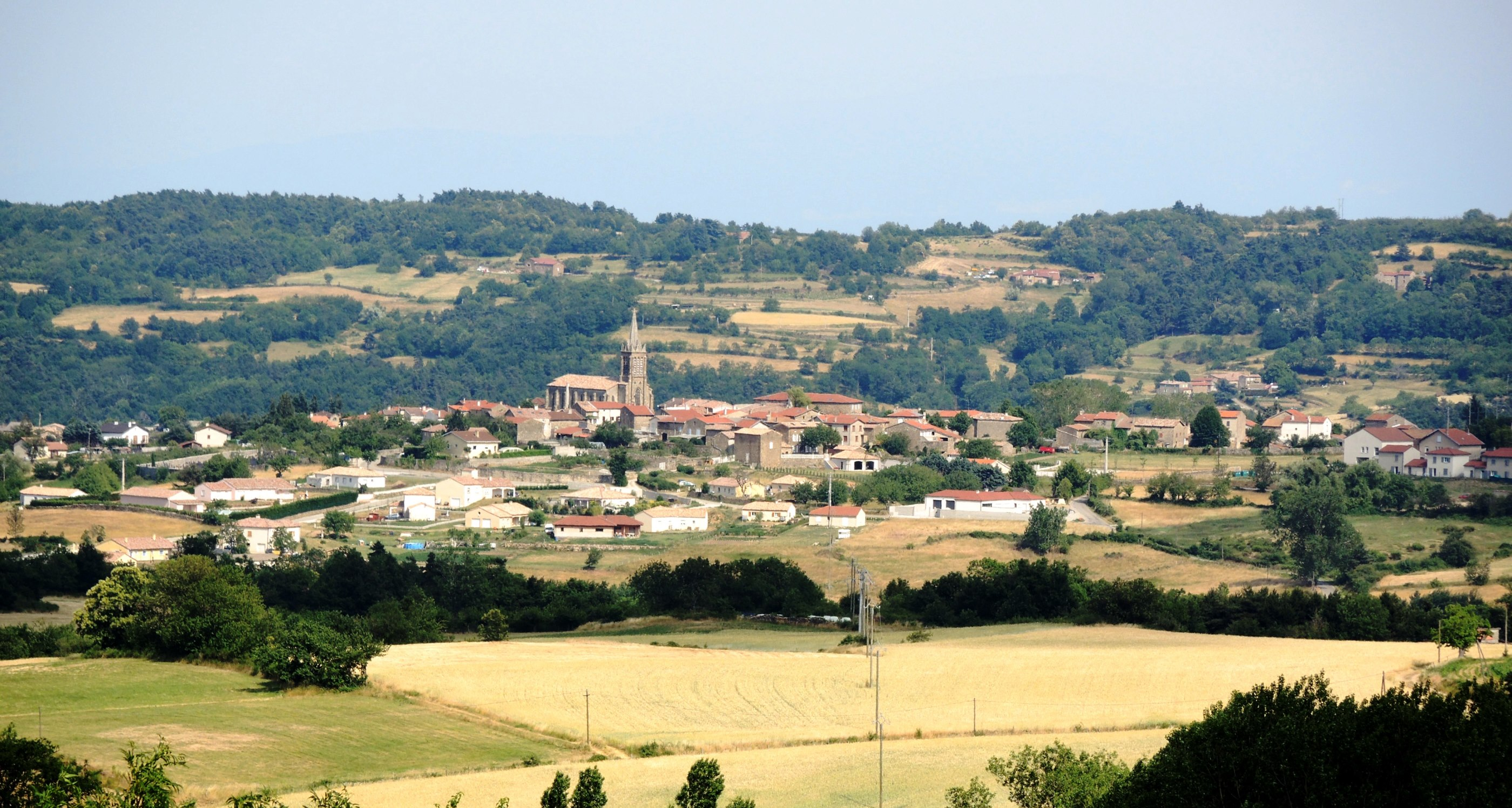 Préaux vue générale